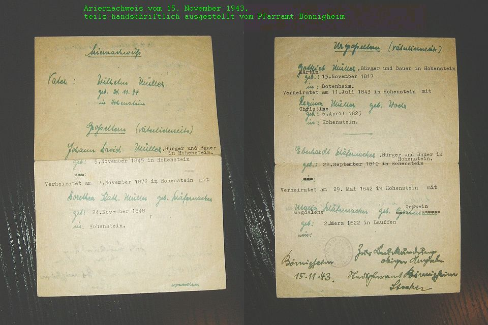 Bild selbst erstellt. Dokument in meinem Besitz. Dieser Ariernachweis war nötig geworden, da ein Vorfahre namens David als Großvater bei der Einberufung zum Militärdienst angegeben worden war. Ausgestellt wurde der teils handschriftlich ausgefertigte Nachweis vom Stadtpfarramt Bönnigheim in Baden-Württemberg. --Peng 10:43, 16 June 2006 (UTC)